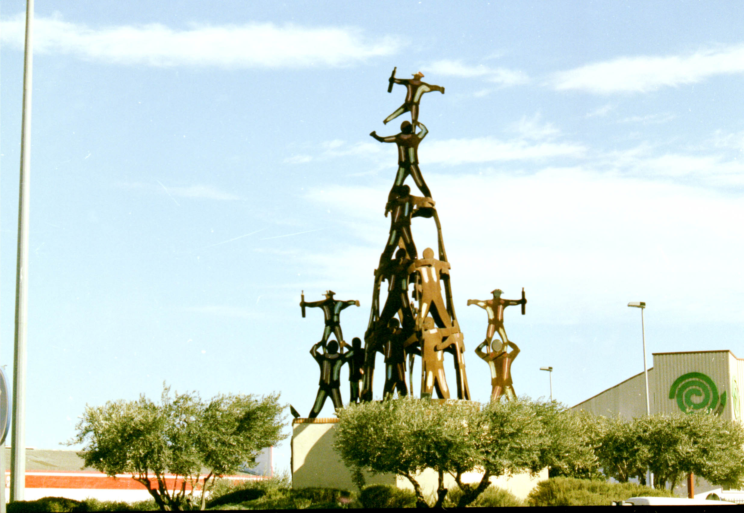 Algemesí. Muixeranga. Subido con permiso del autor.